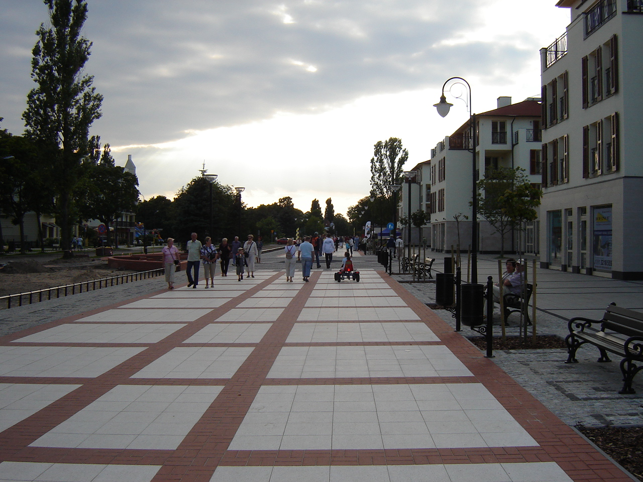 Świnoujście